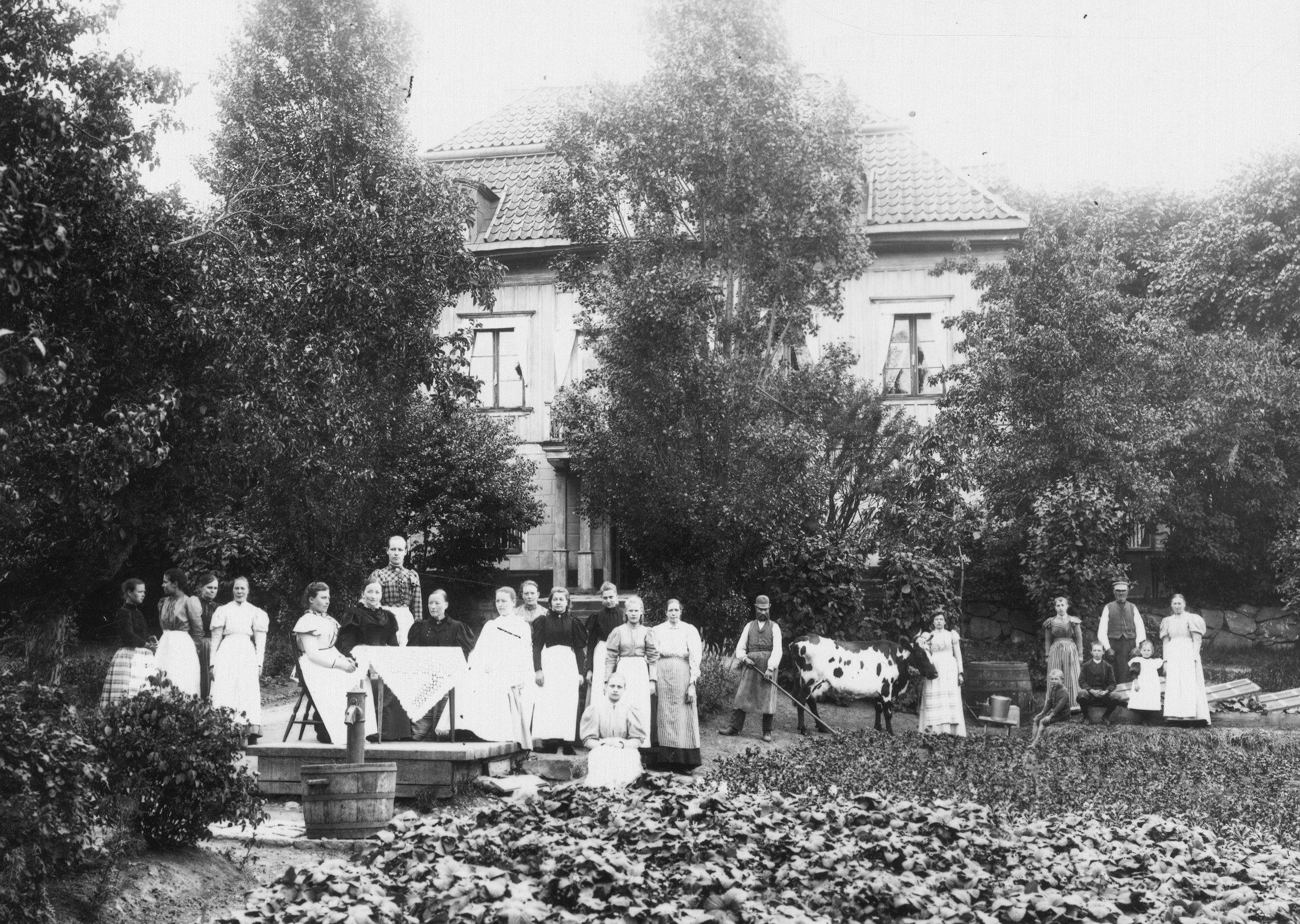 Elsa Borgs räddningshem i Werner Groens malmgård, sedd från trädgården